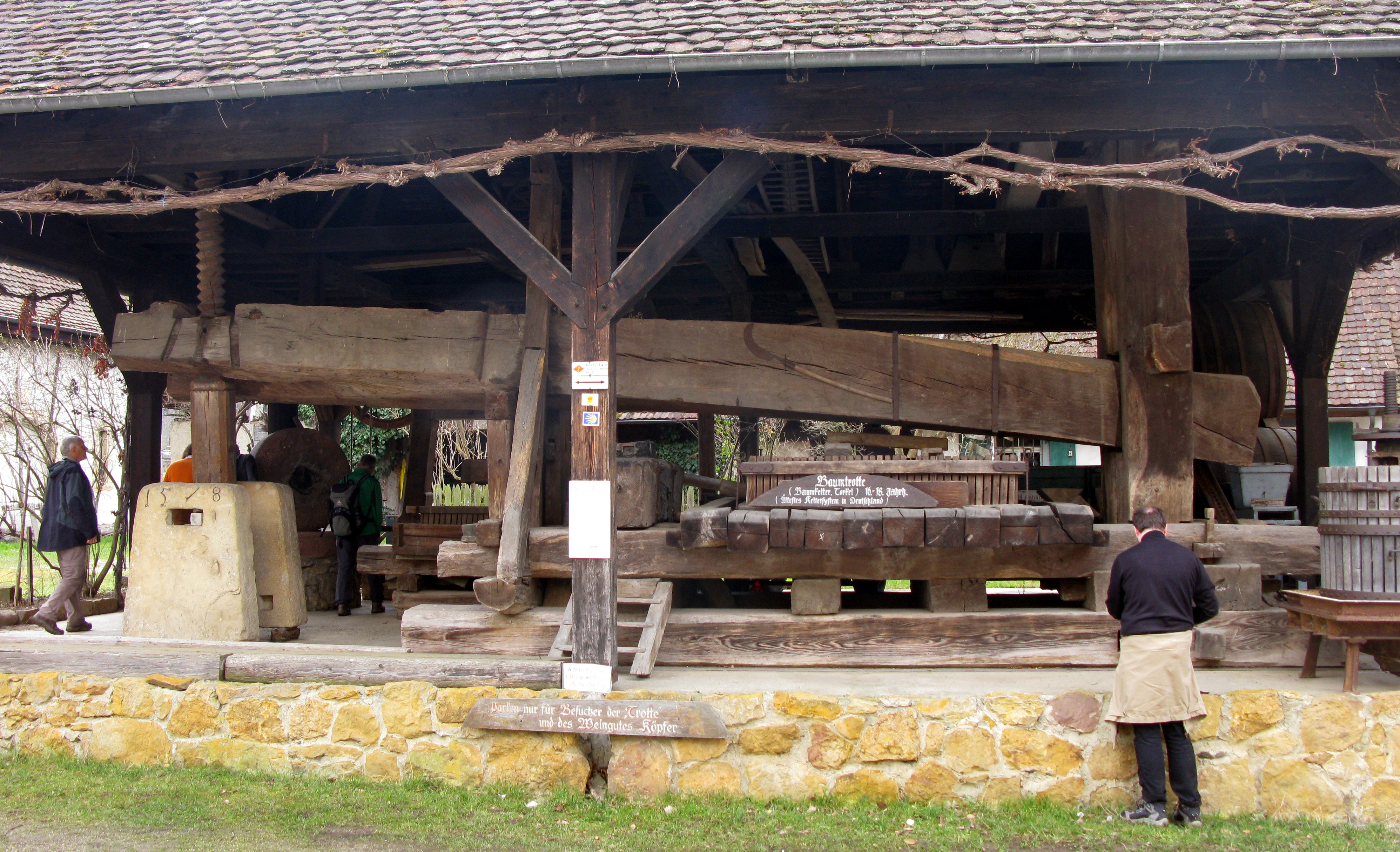 Baumtrotte in Staufen-Grunern